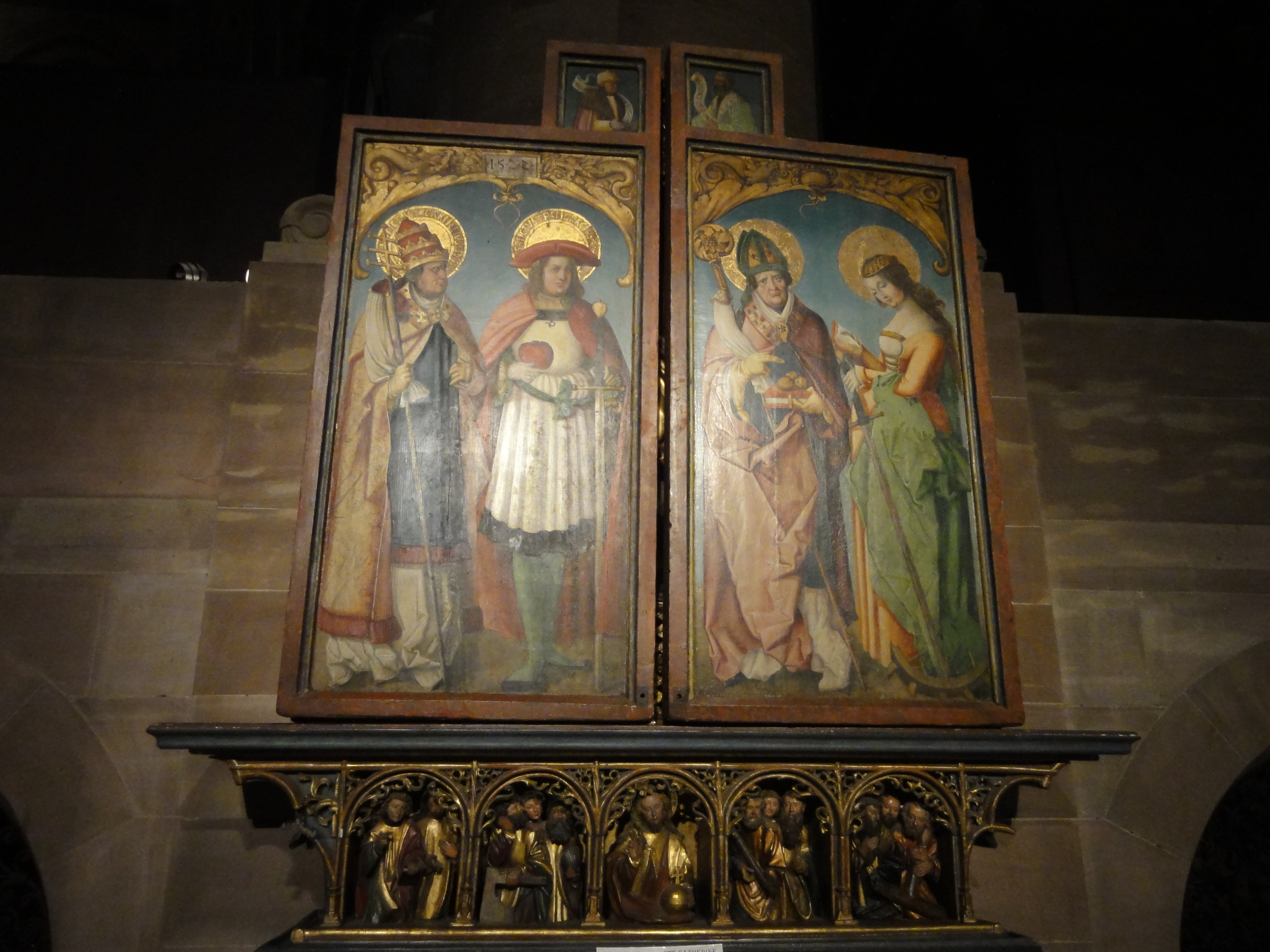 Alsace, Bas-Rhin, Cathédrale Notre-Dame de Strasbourg (PA00085015).Transept: Retable de saint Pancrace, saint Nicolas et sainte Catherine (1522): Vue du retable fermé, Peintures (St-Corneille, St-Pancrace, St-Nicolas, Ste-Catherine).